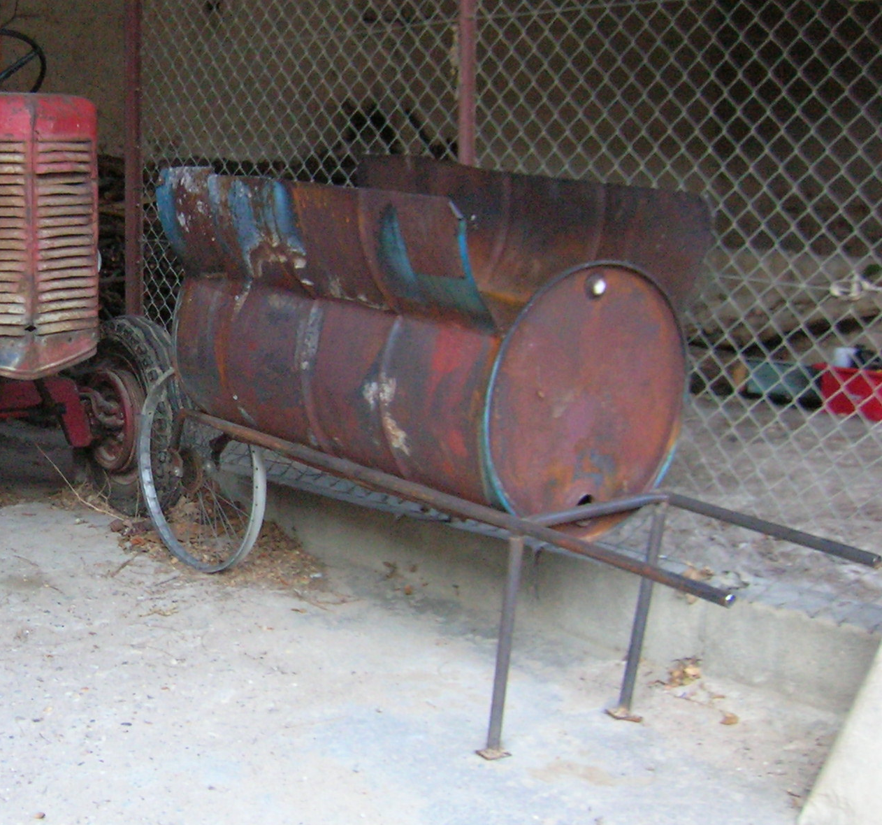 bricolage agricole Lantignié, Rhône, FRANCE